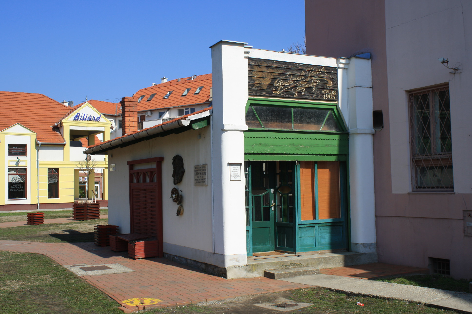 Fridrich János fényírdája - ATELIER 1905 (Szentes)